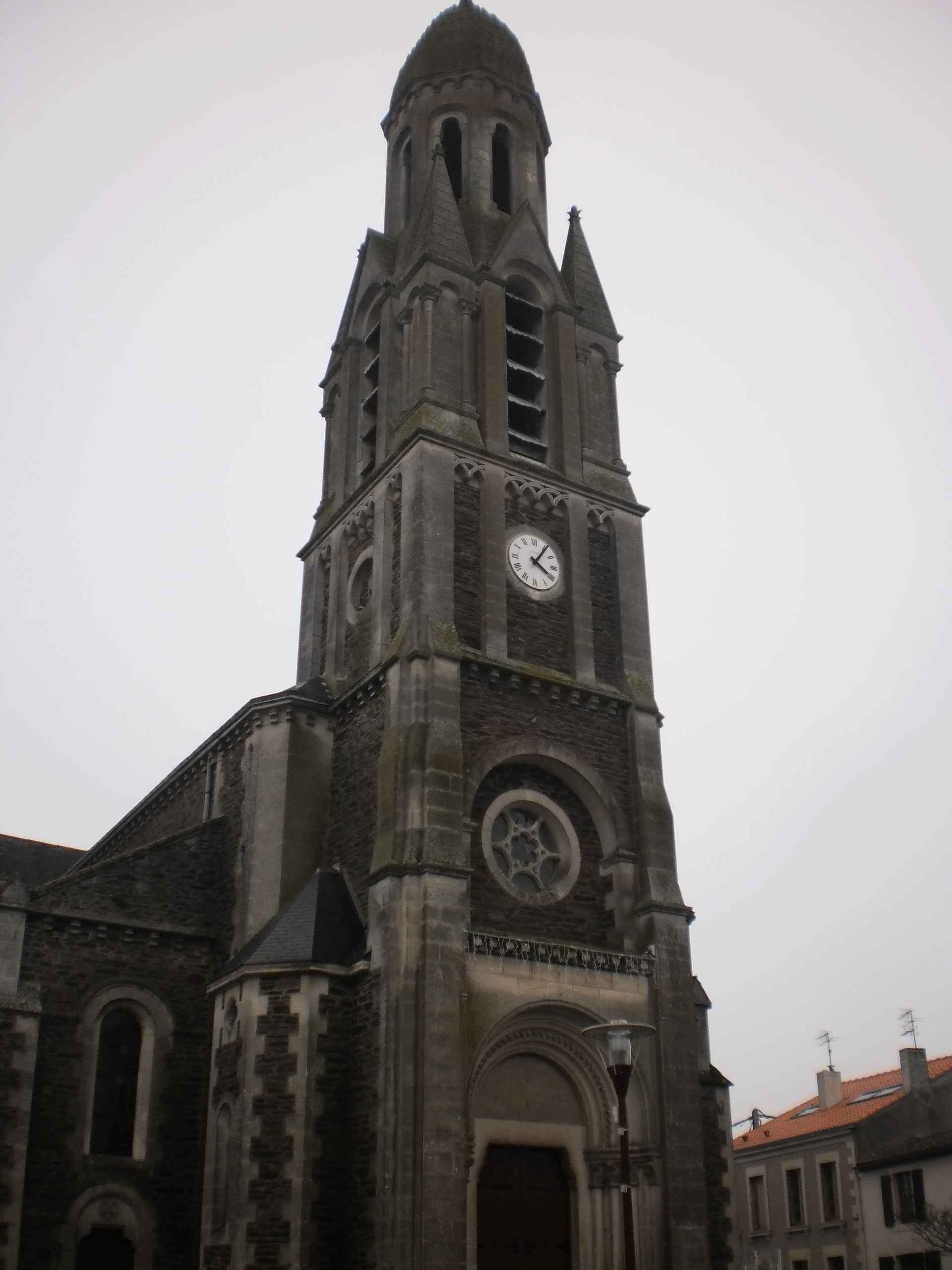 La Boissière-du-Doré (Loire-Atlantique, France) - église